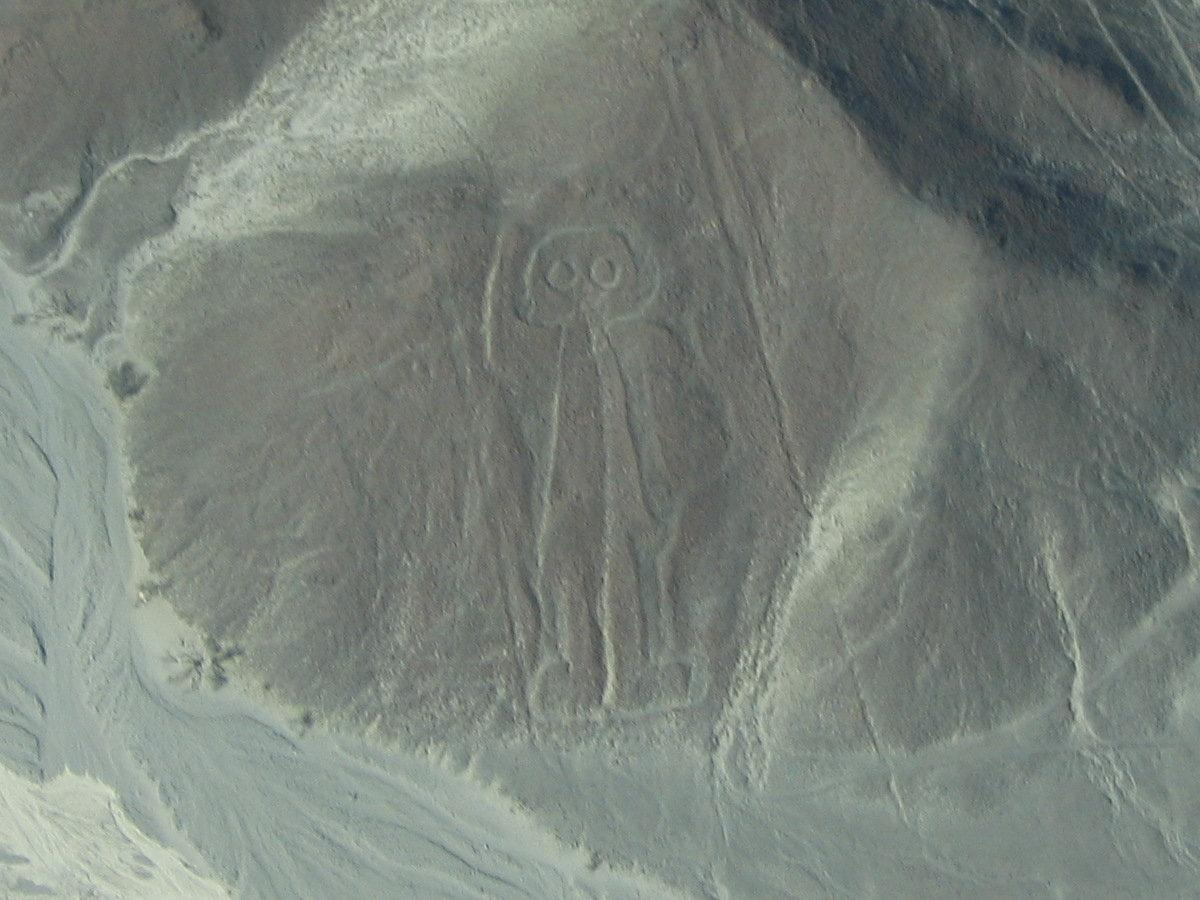 Nasca (Peru), Astronaut, August 2007